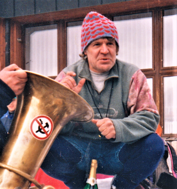 Chatár a horský nosič Viktor Beránek z Chaty pod Rysmi